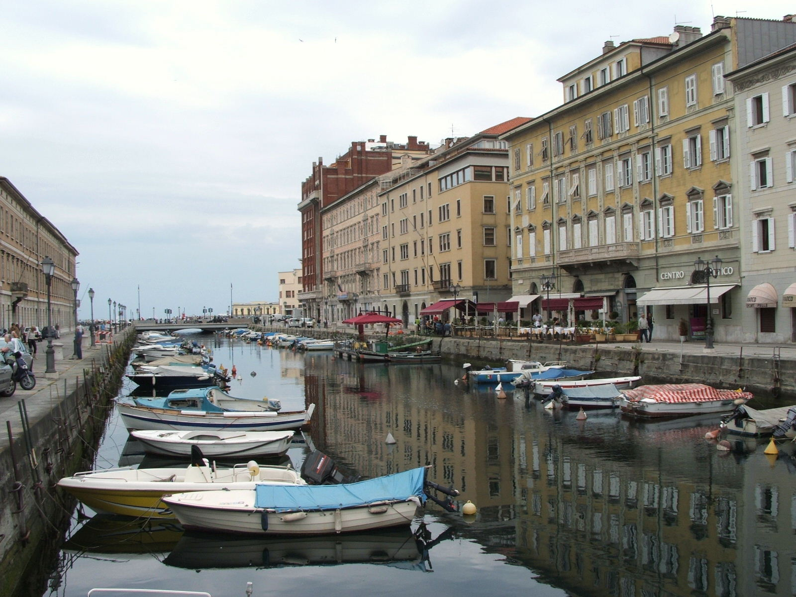 Immagine da Trieste, Friuli-Venezia Giulia, Italia.